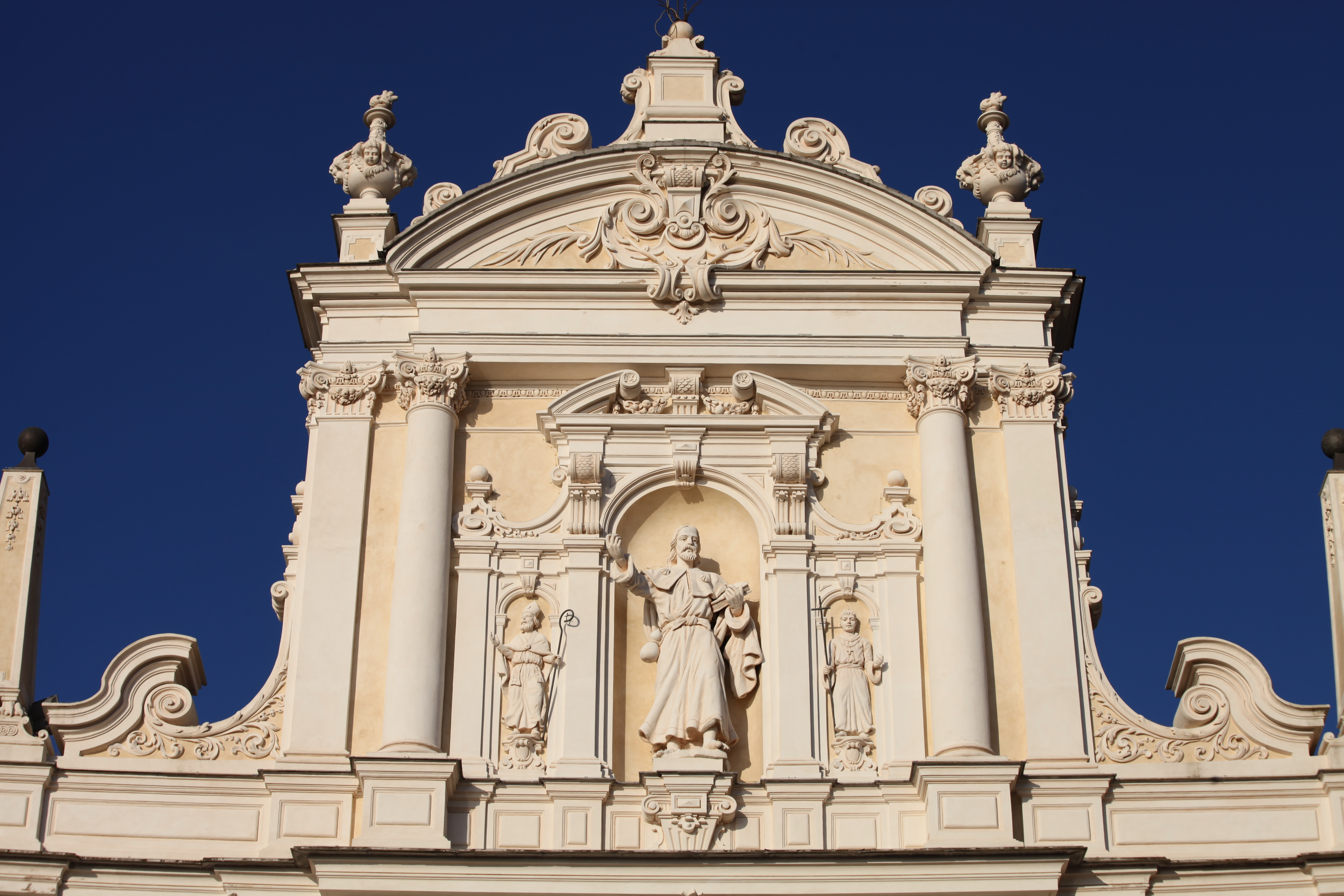 Santuario di Nostra Signora della Lettera, Santa Margherita Ligure